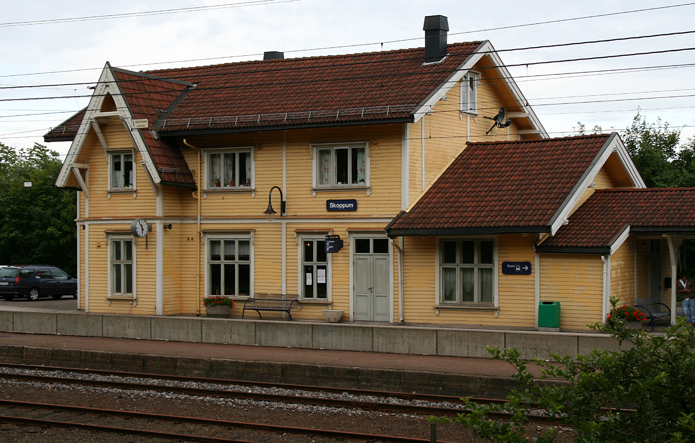 Skoppum stasjon, Vestfoldbanen. Bygd 1880. Arkitekt: Balthazar Lange.